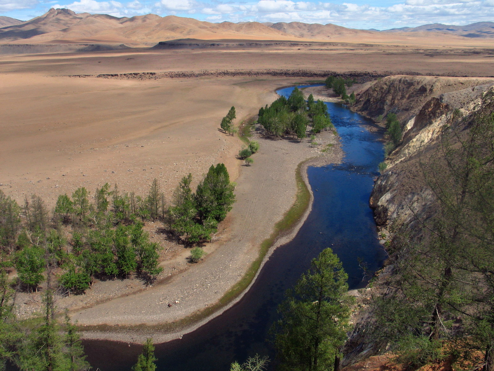 Oberlauf des Flusses Orchon in der Mongolei